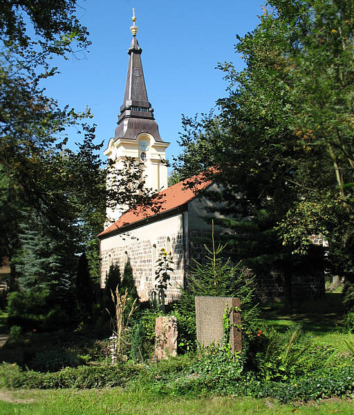 Kirche in Stolpe-Dorf